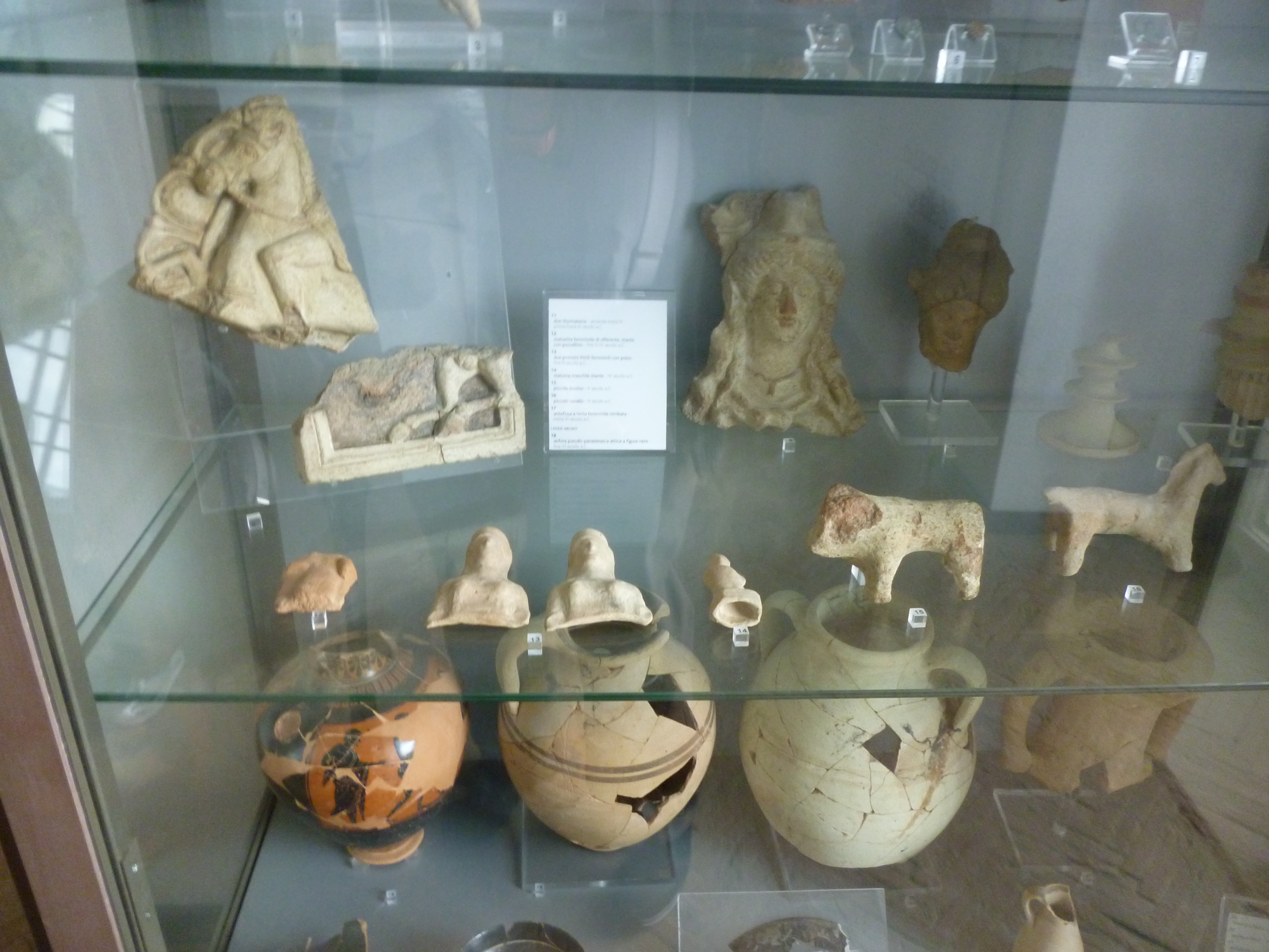 המוזיאון הארכאולוגי של קמפי פליגריי